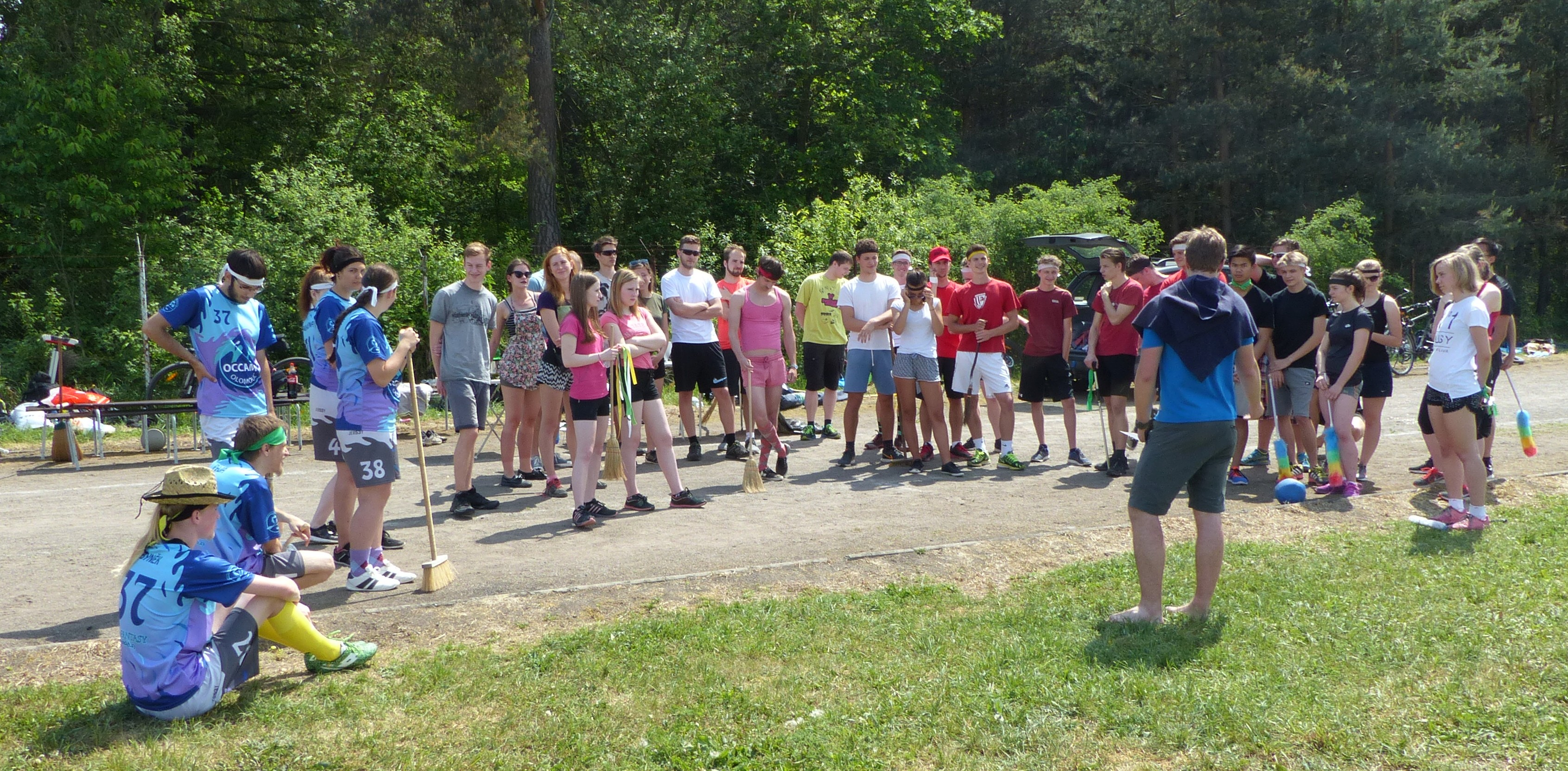 Vysvětlování pravidel během 4. ročníku Mejtského famfrpálu